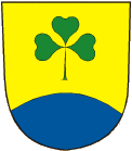 znak města